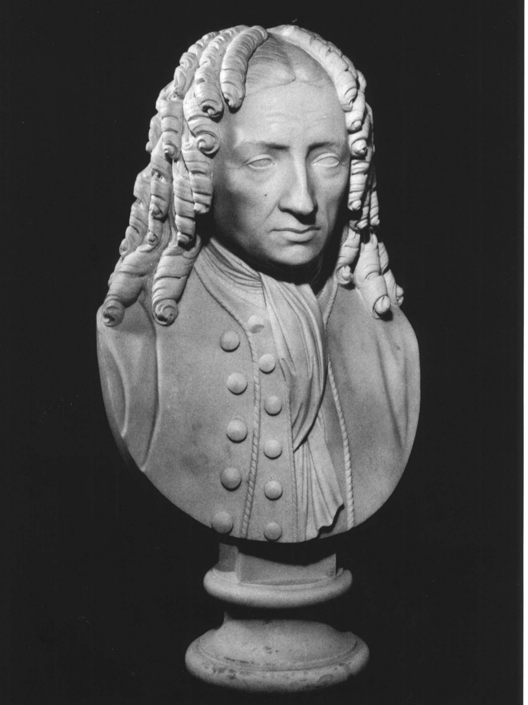 Busto di Apostolo Zeno, opera di Pietro Bearzi precedente al 1847. Il busto fa parte del Panteon Veneto, conservato presso Palazzo Loredan di Campo Santo Stefano a Venezia.